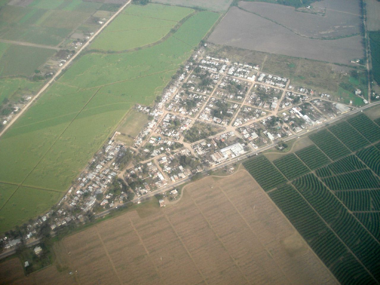 Vista aérea de la localidad de El Chañar, Departamento Burruyacu, Tucumán.